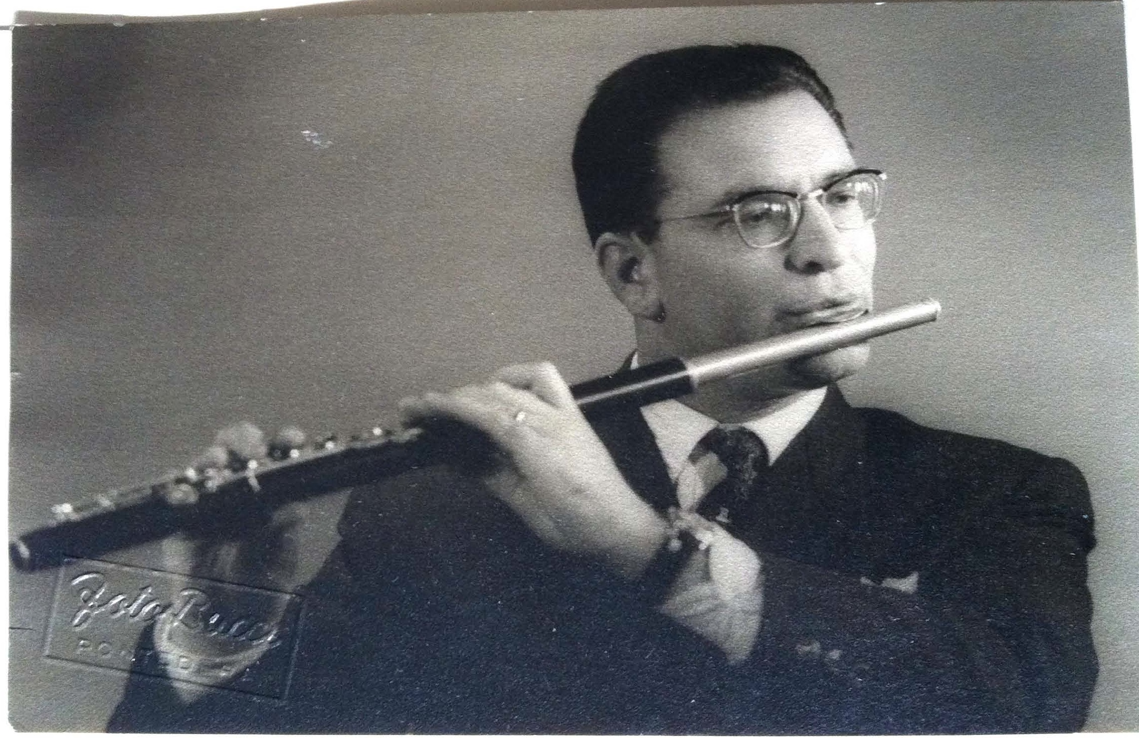 Bixio Daini in una foto del 1954 col suo flauto Ruddal-Carte con testata in argento.